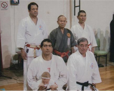 Maestro Shinzato en un Seminario dictado en Argentina, rodeado de dos Maestros y dos alumnos.